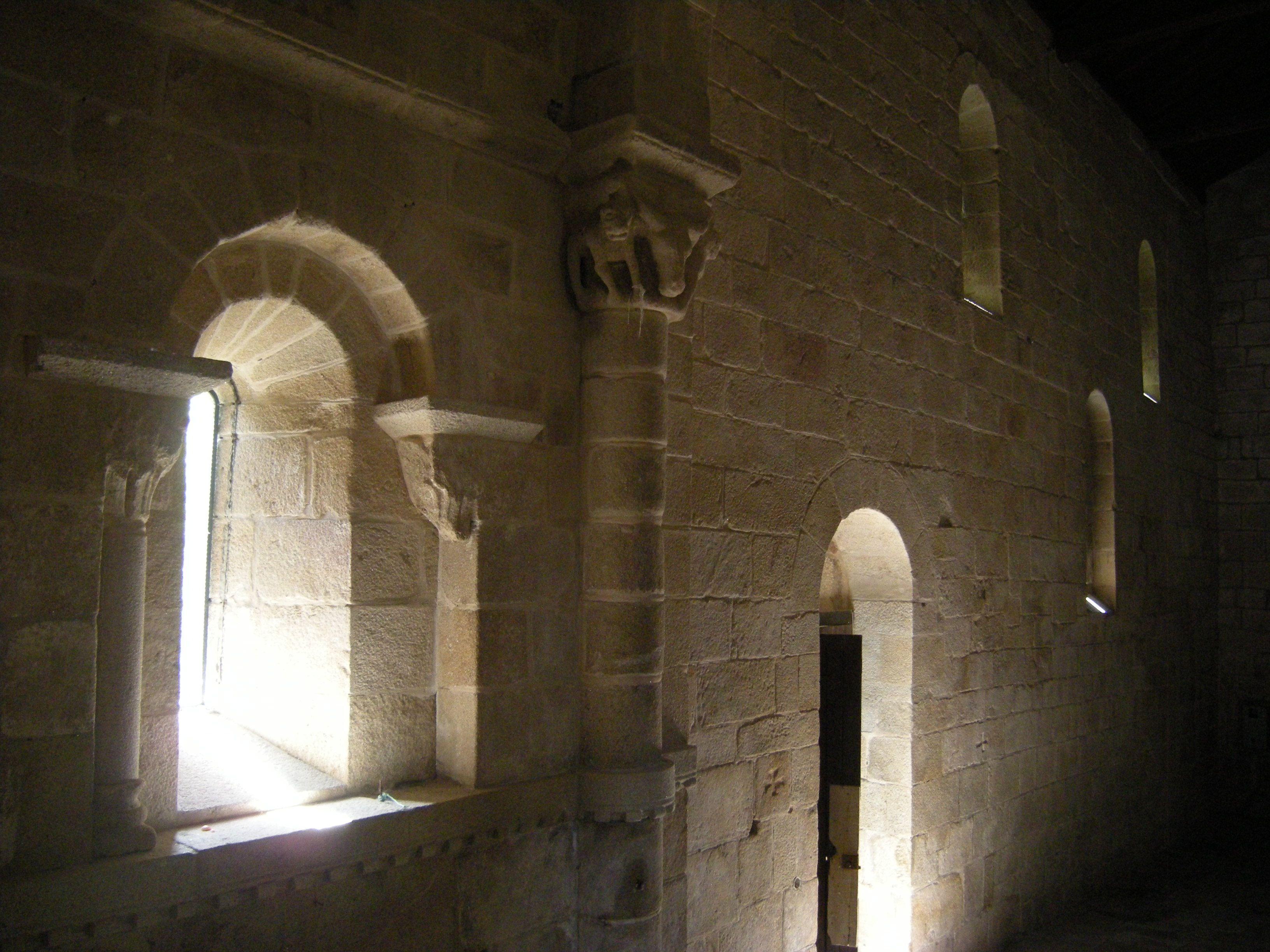 Iglesia de Sanfins de Friestas